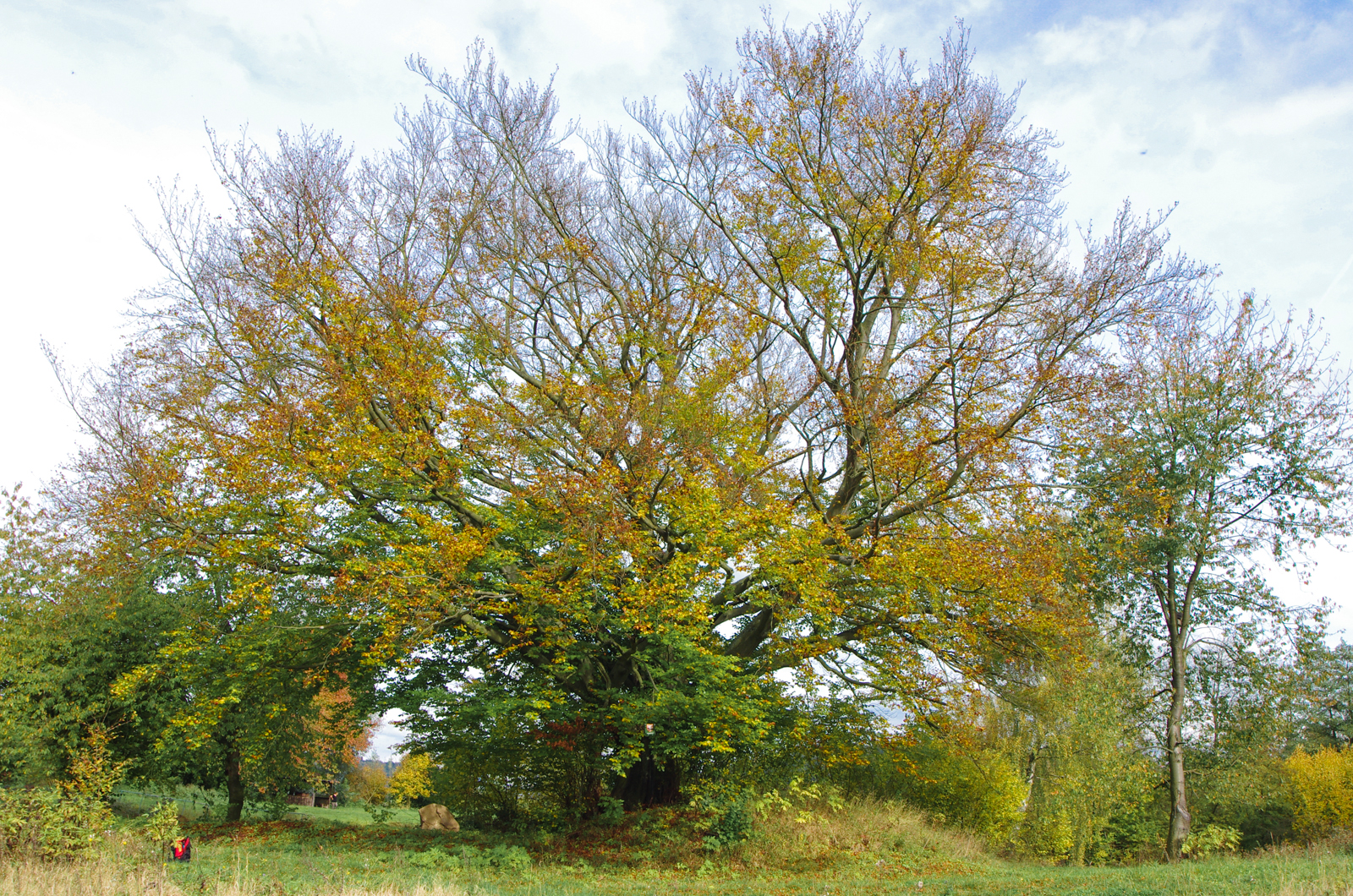 památné stromy - Buky u Sedlečka, okres Karlovy Vary